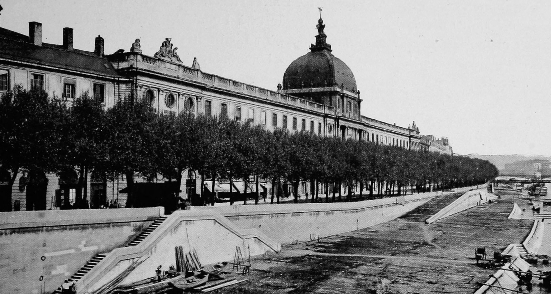 Dictionnaire illustré des communes du département du Rhône. Tome 2 / par MM. E. de Rolland et D. Clouzet.